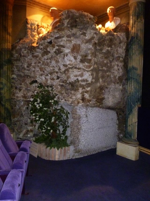 Municipium Iuvavum